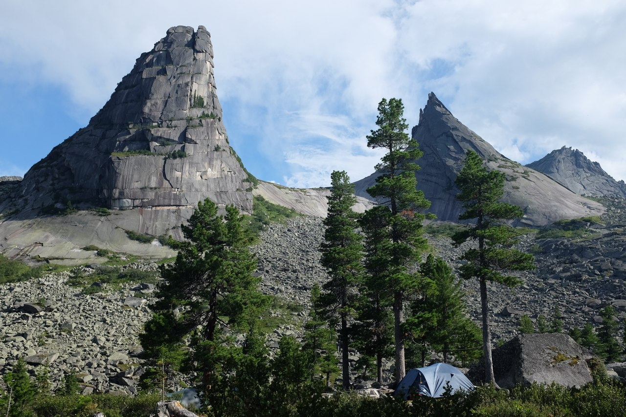 Ергаки, Ермаковский район This image is related to the protected area of Russia number 2410078